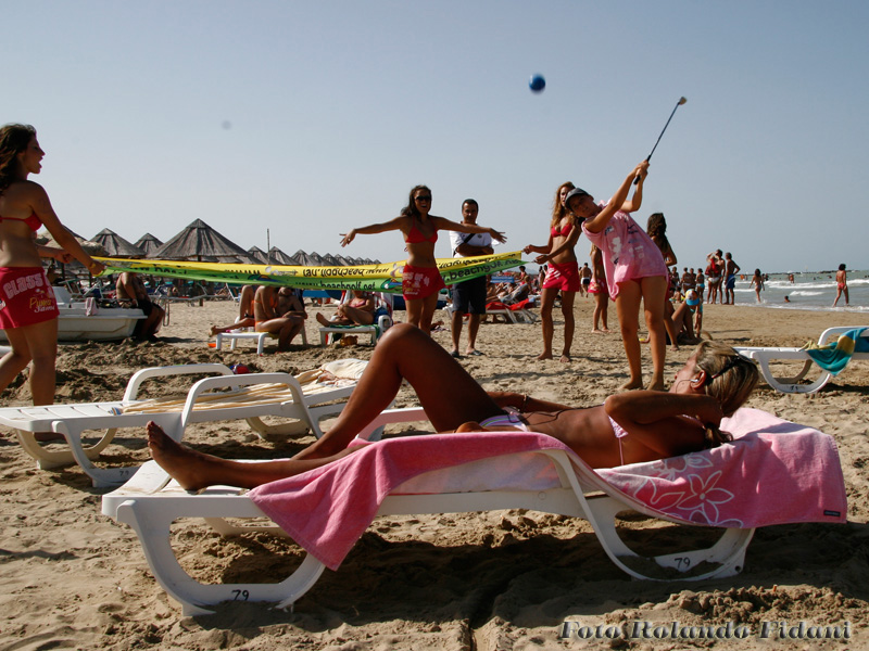 Golf in spiaggia durante il Beach Golf Pescara 2007